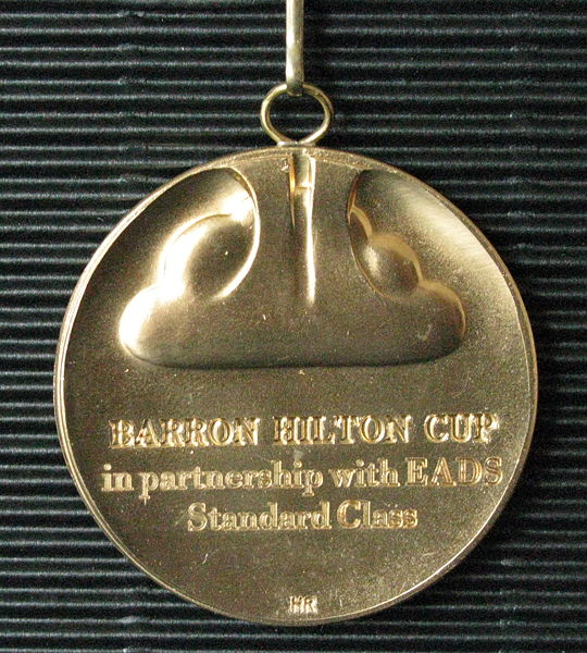 Vorderseite der Siegermedaille des Barron Hilton Cups